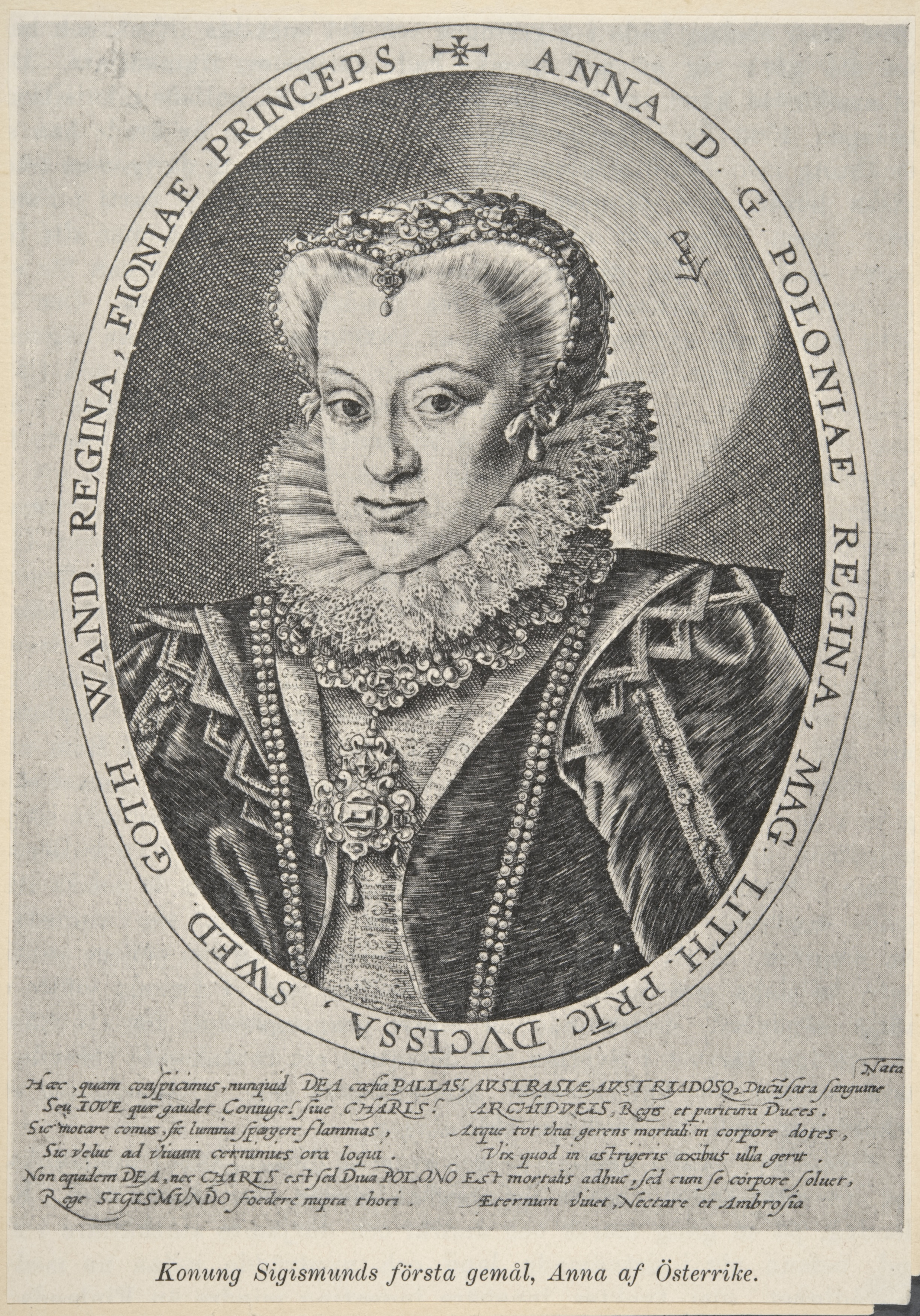 Kuningas Sigismund III:n ensimmäinen puoliso Itävallan arkkiherttua Karlin tytär Anna